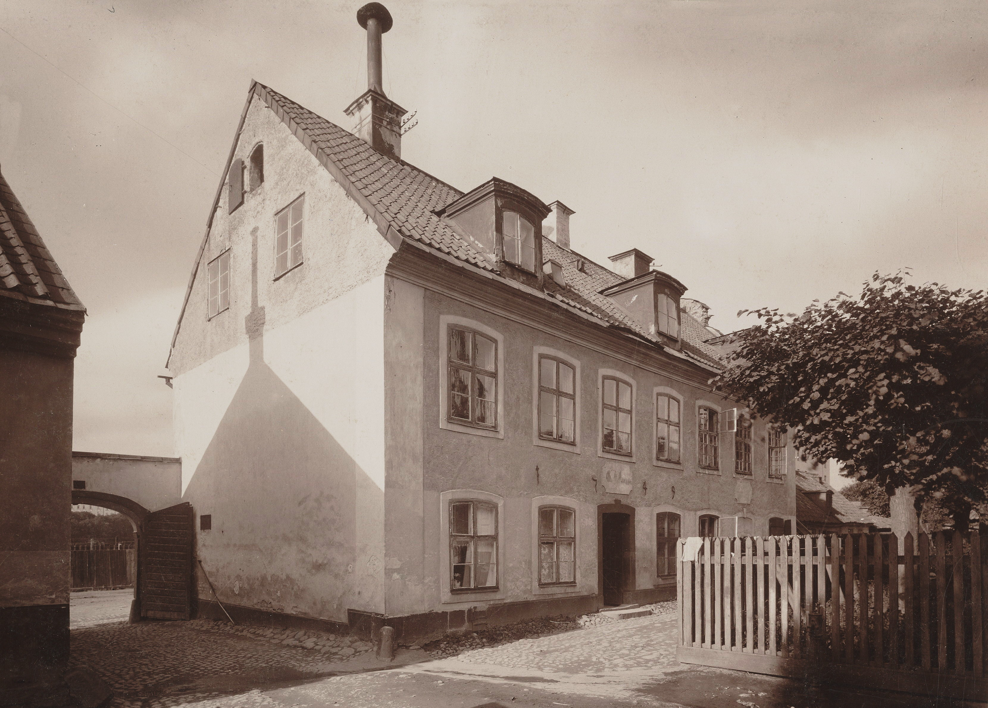 Dagens Malmgårdsvägen 55C, gårdssidan